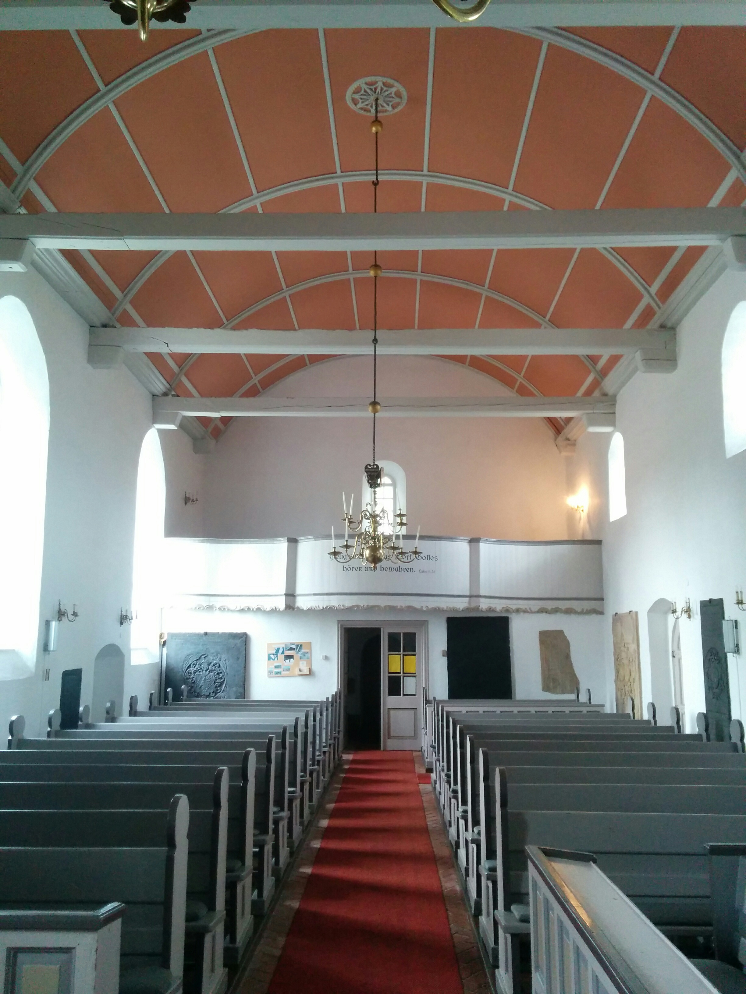 Innenraum der Kirche in Ditzum